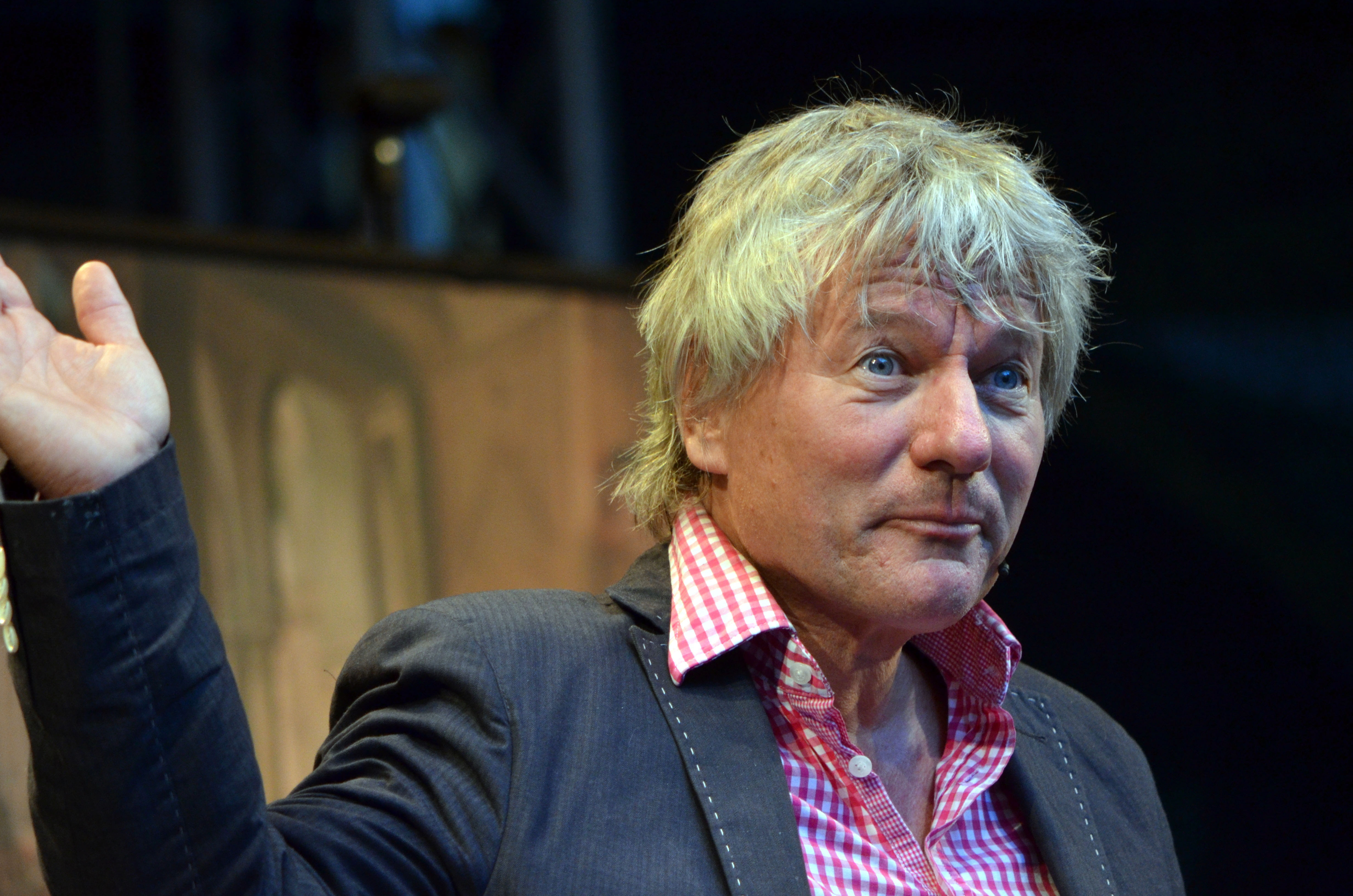 Jürgen Becker präsentiert sein Programm „Ja, was glauben Sie denn?“ am 9. Juli 2011 im Innenhof des Wolfenbütteler Schlosses.